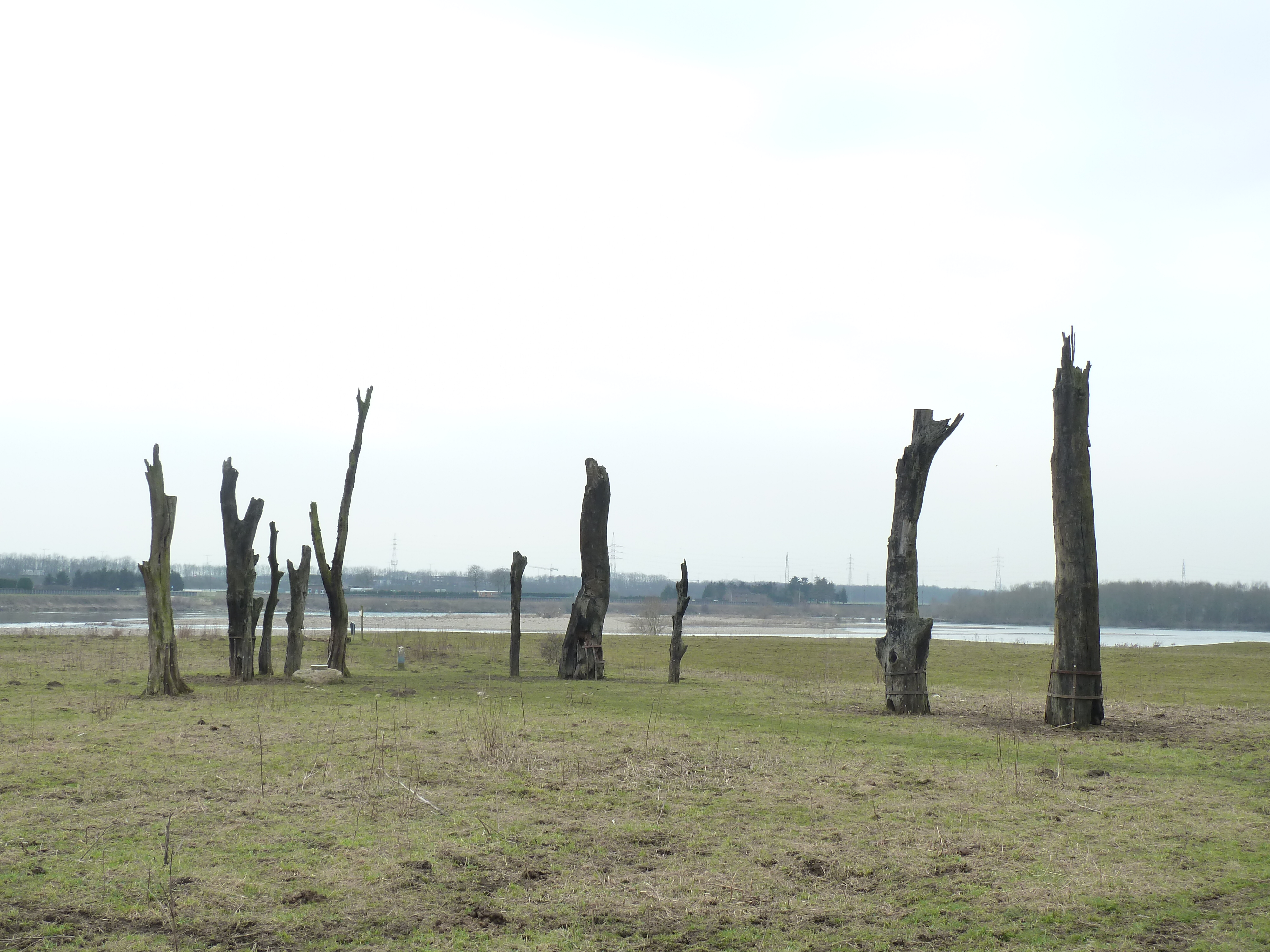 Bomencirkel van Meers (Woodhenge), Meers, Stein, Limburg, Nederland